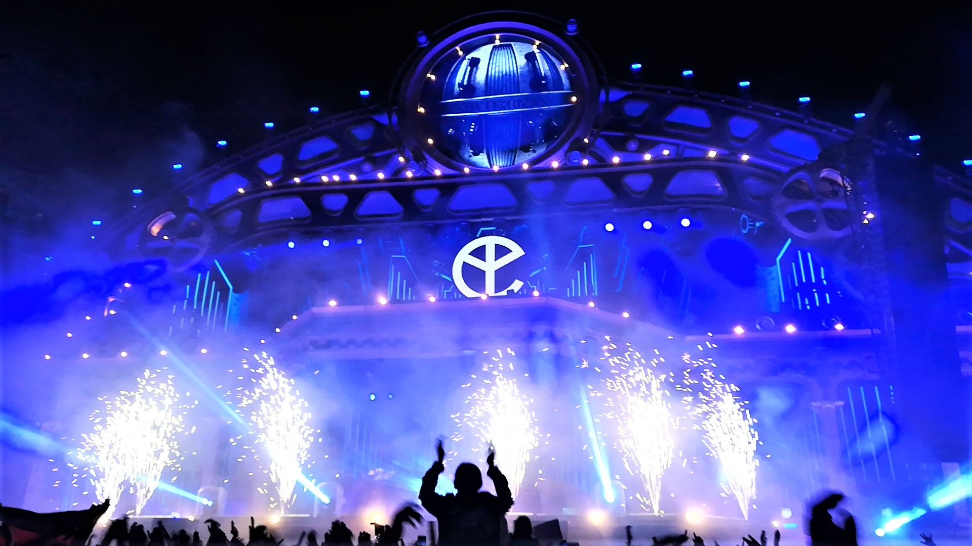 New Horizons Festival Mainstage Capital Park Yellow Claw